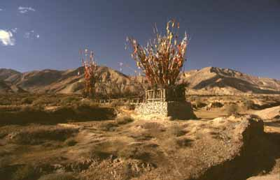 Lhato. Lhatos in Tibet sind gemauerte Steinsetzungen als Opfergaben für die Götter. Hier: Lhatos im Rebkong-Tal, Amdo (Qinghai, VR China) Bildquelle: eigenes Foto Foto: Andreas Gruschke (Freiburg)